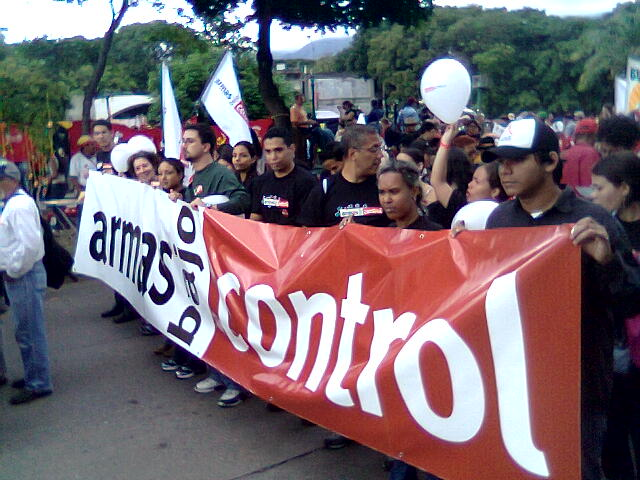 Armas Bajo Control - Activismo de Miembros de Amnistía Internacional Venezuela en Caracas